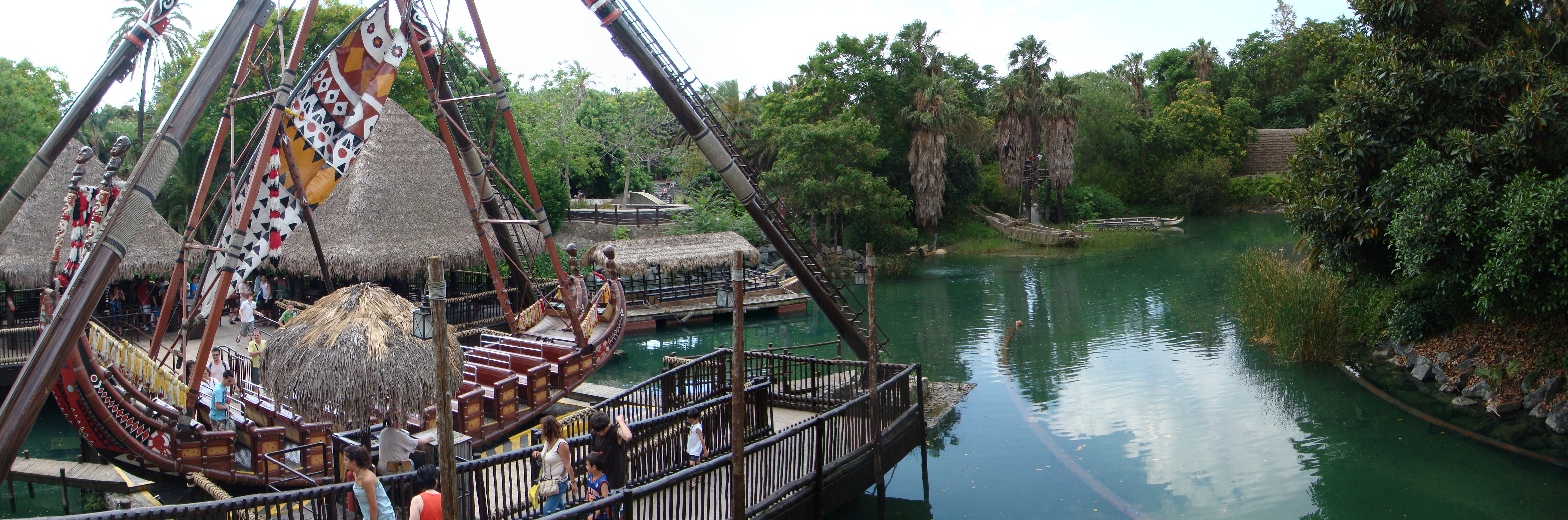 Vista de la atracción Kon Tiki Wave en Polinesia